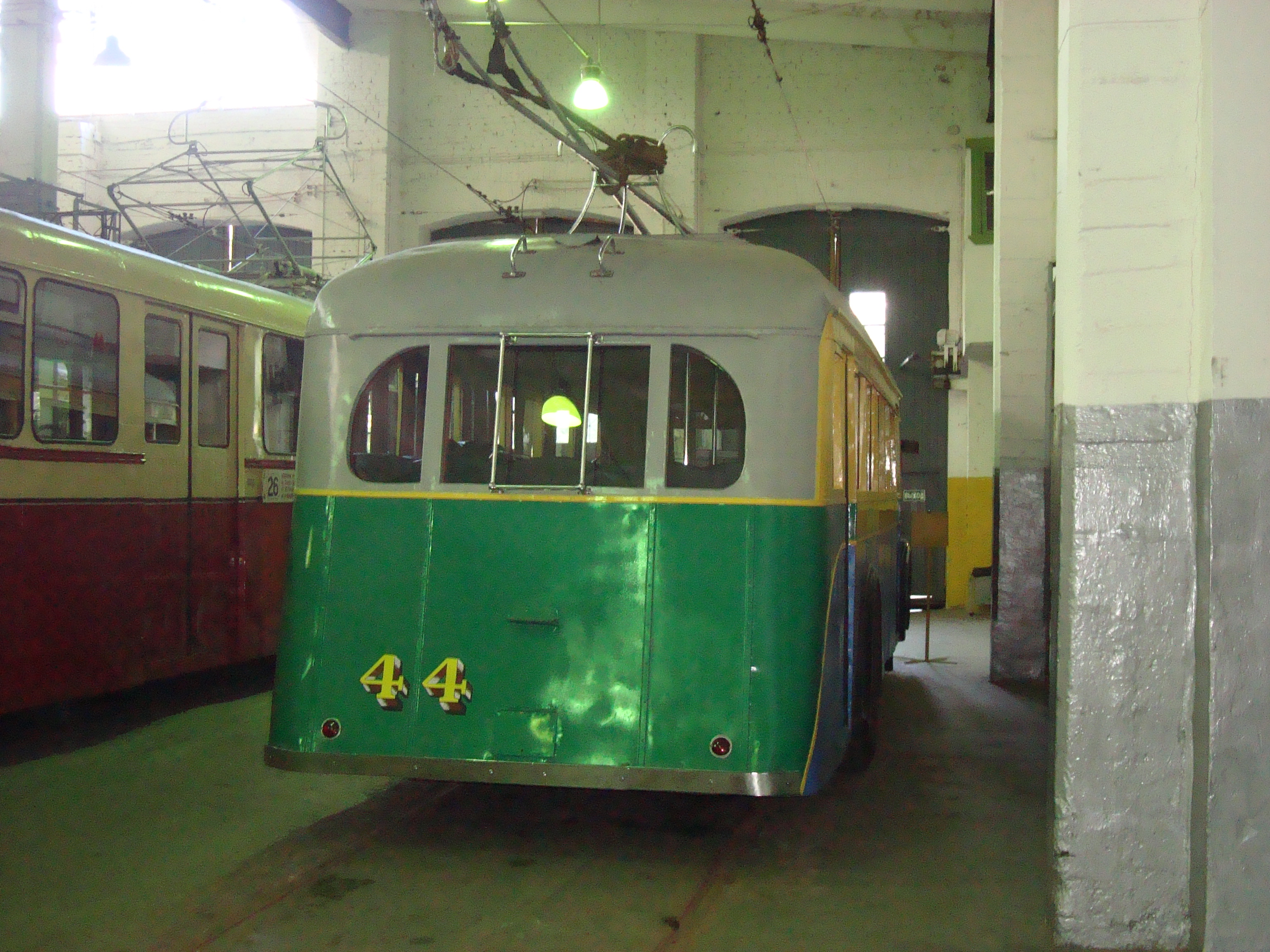 Вид на заднюю часть